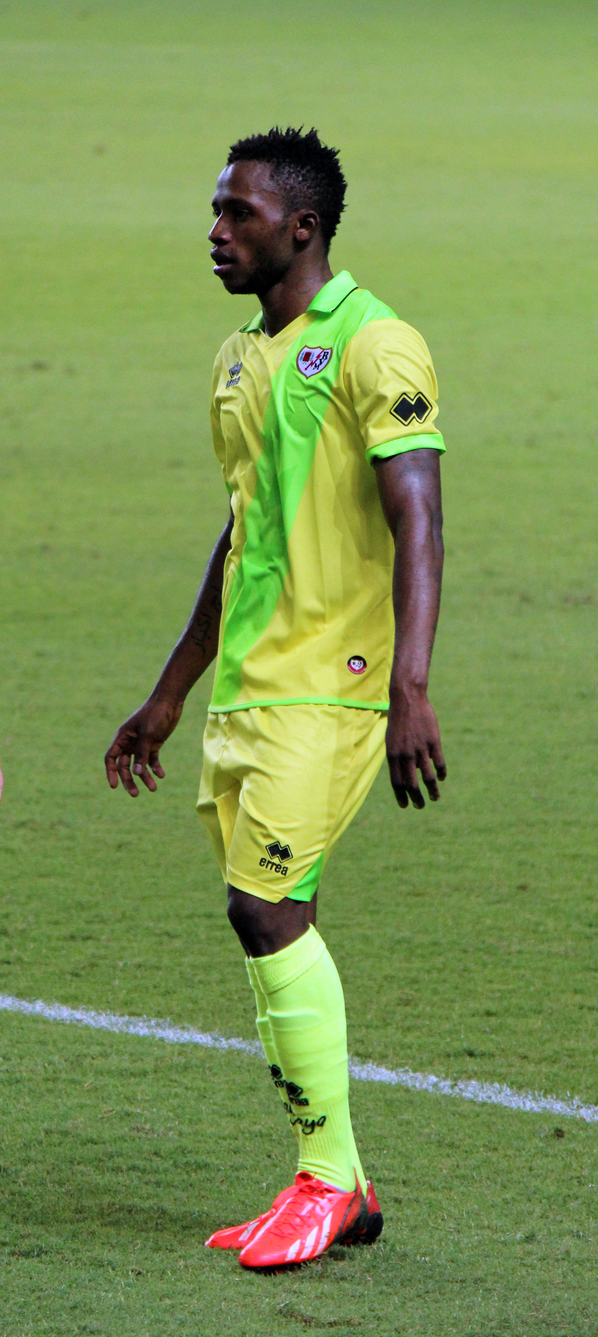 Futbolista del Rayo Vallecano.